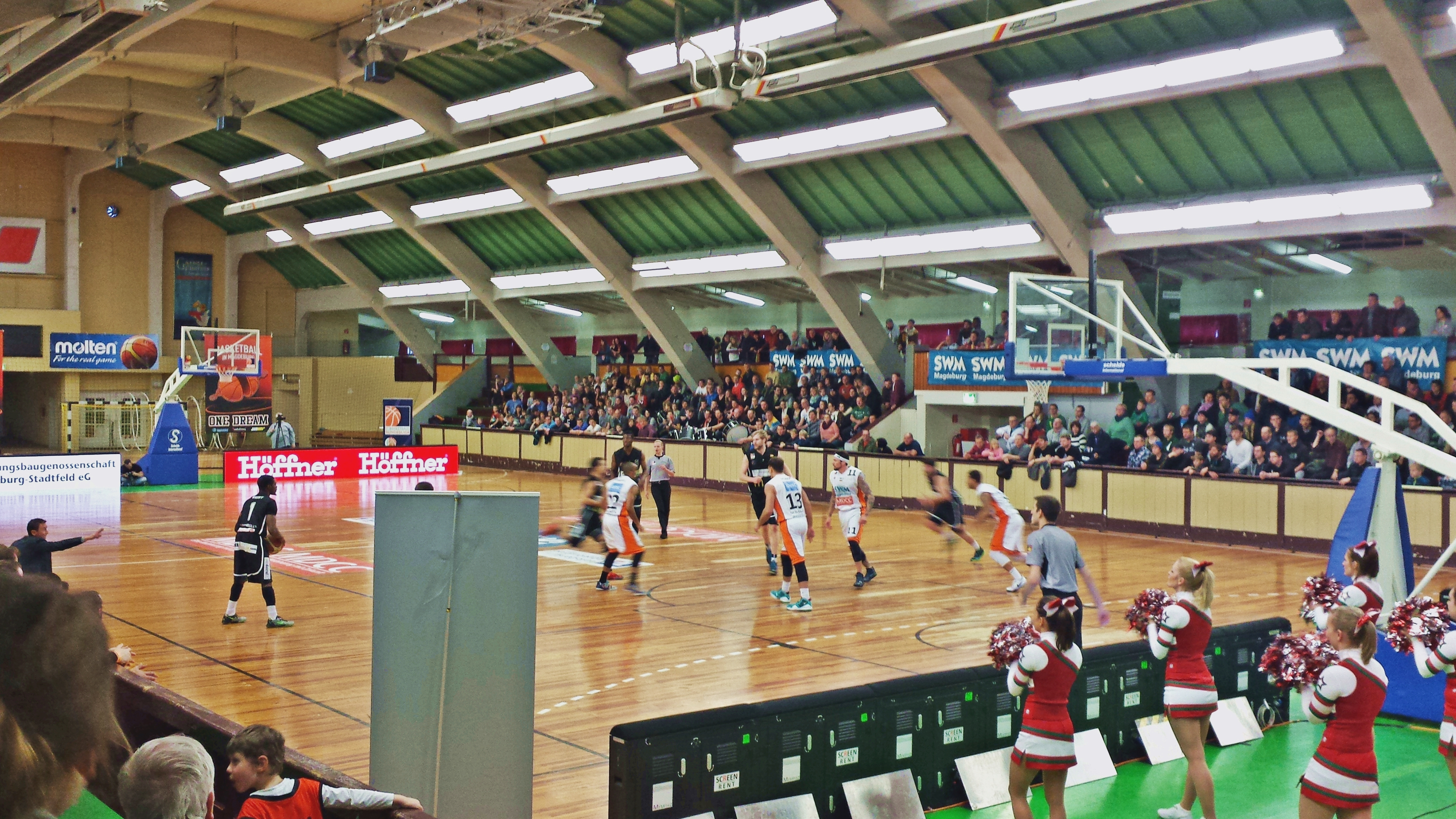 Otto Baskets Magdeburg beim Heimspiel gegen die SC Itzehoe Eagles in der Hermann-Gieseler-Halle